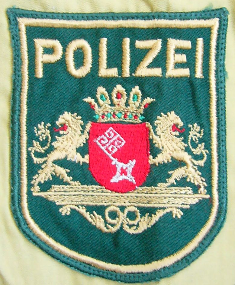 Ärmelabzeichen der Bremischen Polizei